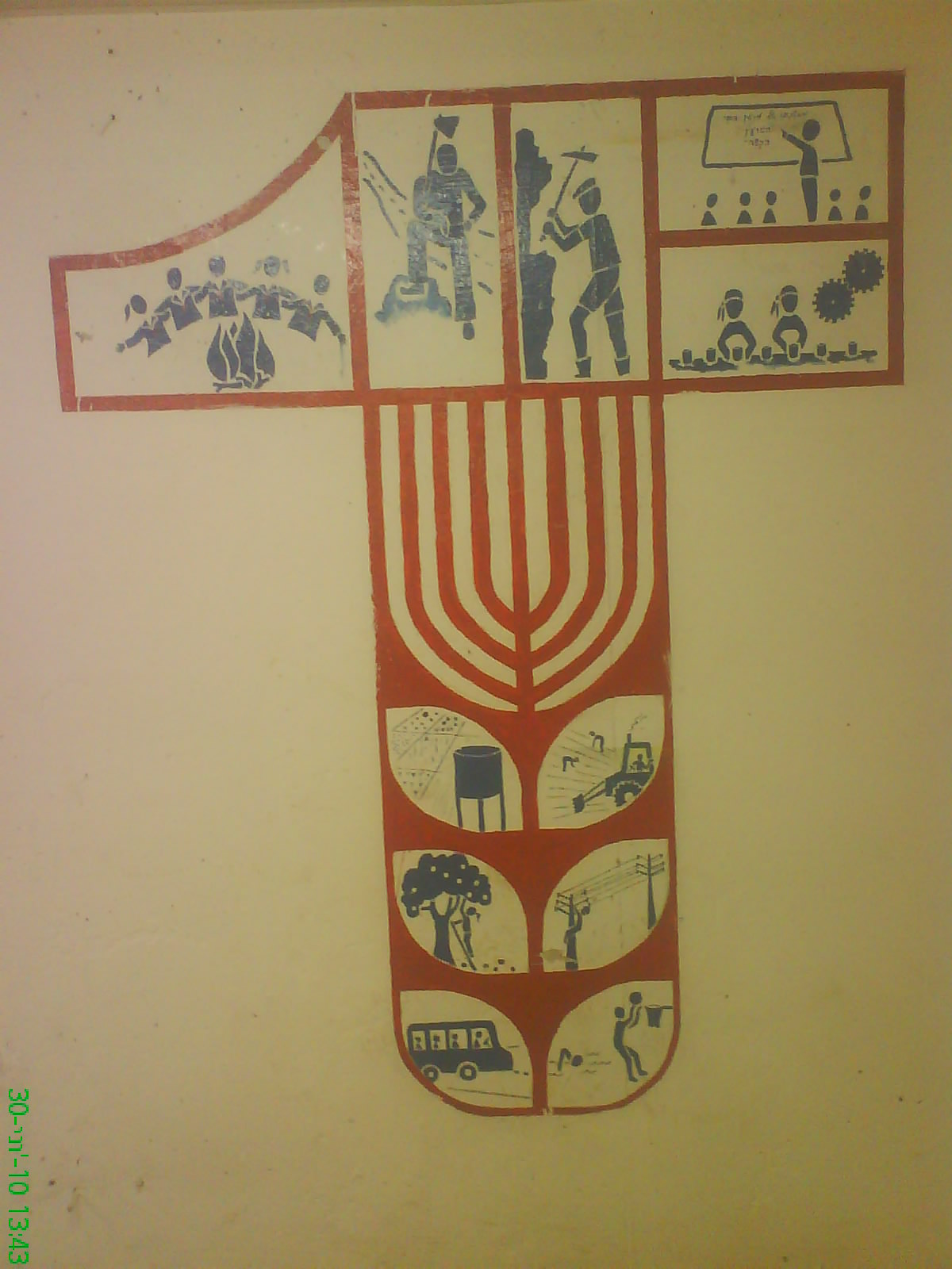 סמל הסתדרות העובדים הכללית ובתוכו ייצוגים של הישגי תנועת העבודה וההתיישבות. ציור קיר במרכז הסמינרים של הנוער העובד והלומד בקיבוץ רביד